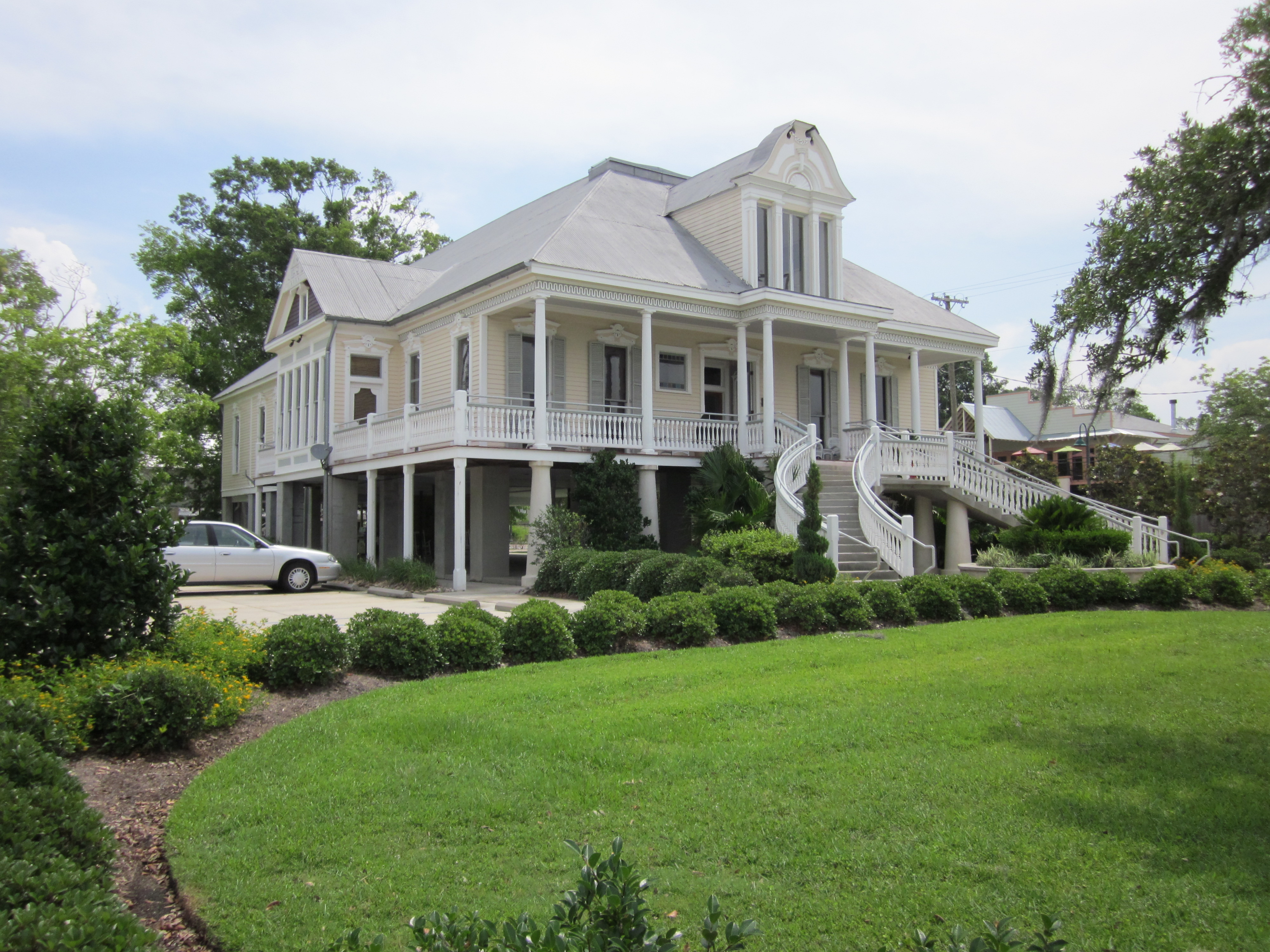 Mandeville, Louisiana.